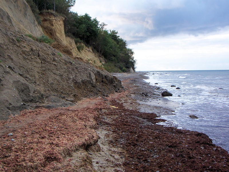 Hangabrutsch an der Steilküste Stoltera